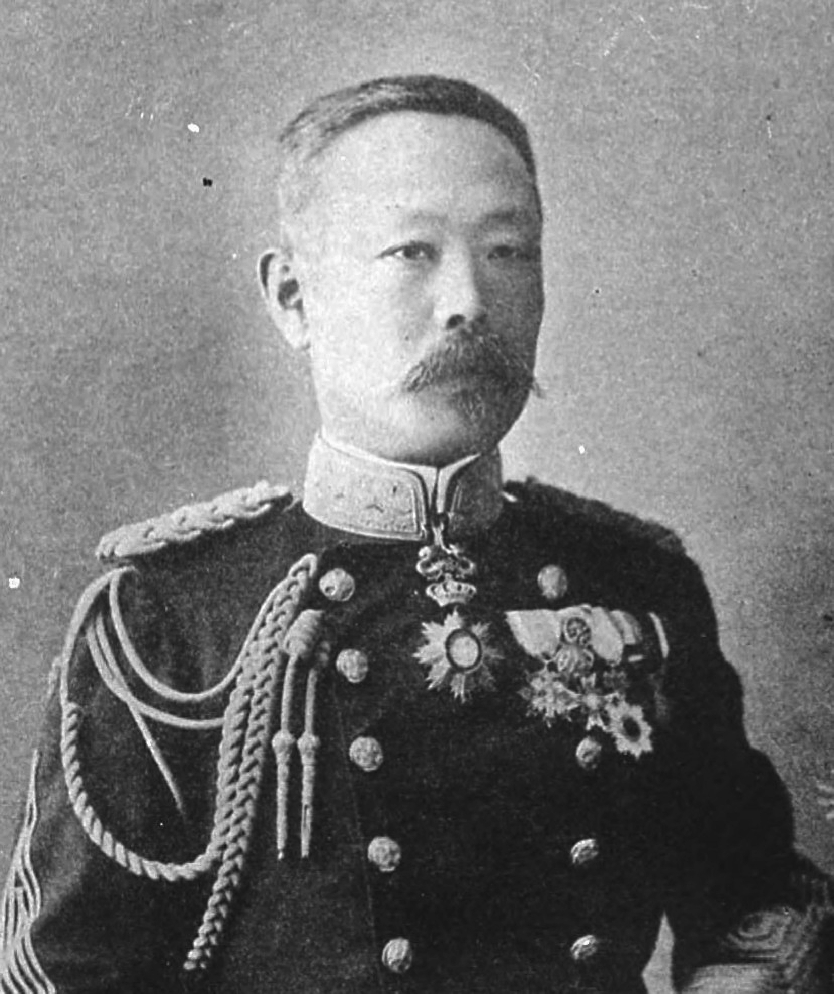 陸軍少将時代の伊地知幸介